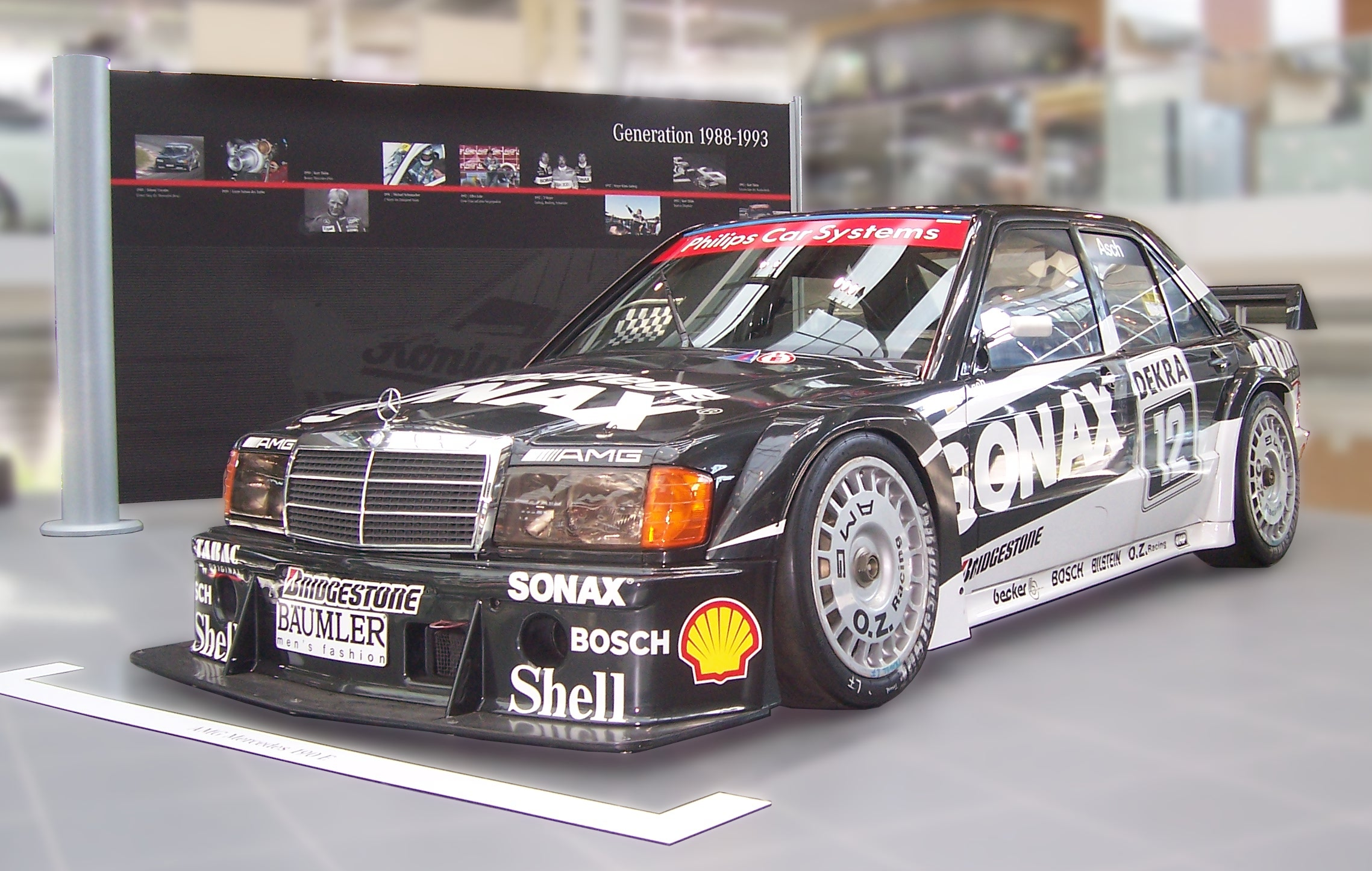 Mercedes-Benz W201 Roland Asch DTM 1993, ausgestellt in der Mercedes-Benz Niederlassung München, Arnulfstraße 61, 80636 München